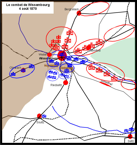 Position des troupes le 4 août avant midi à Wissembourg Carte personnelle Licence GFLD